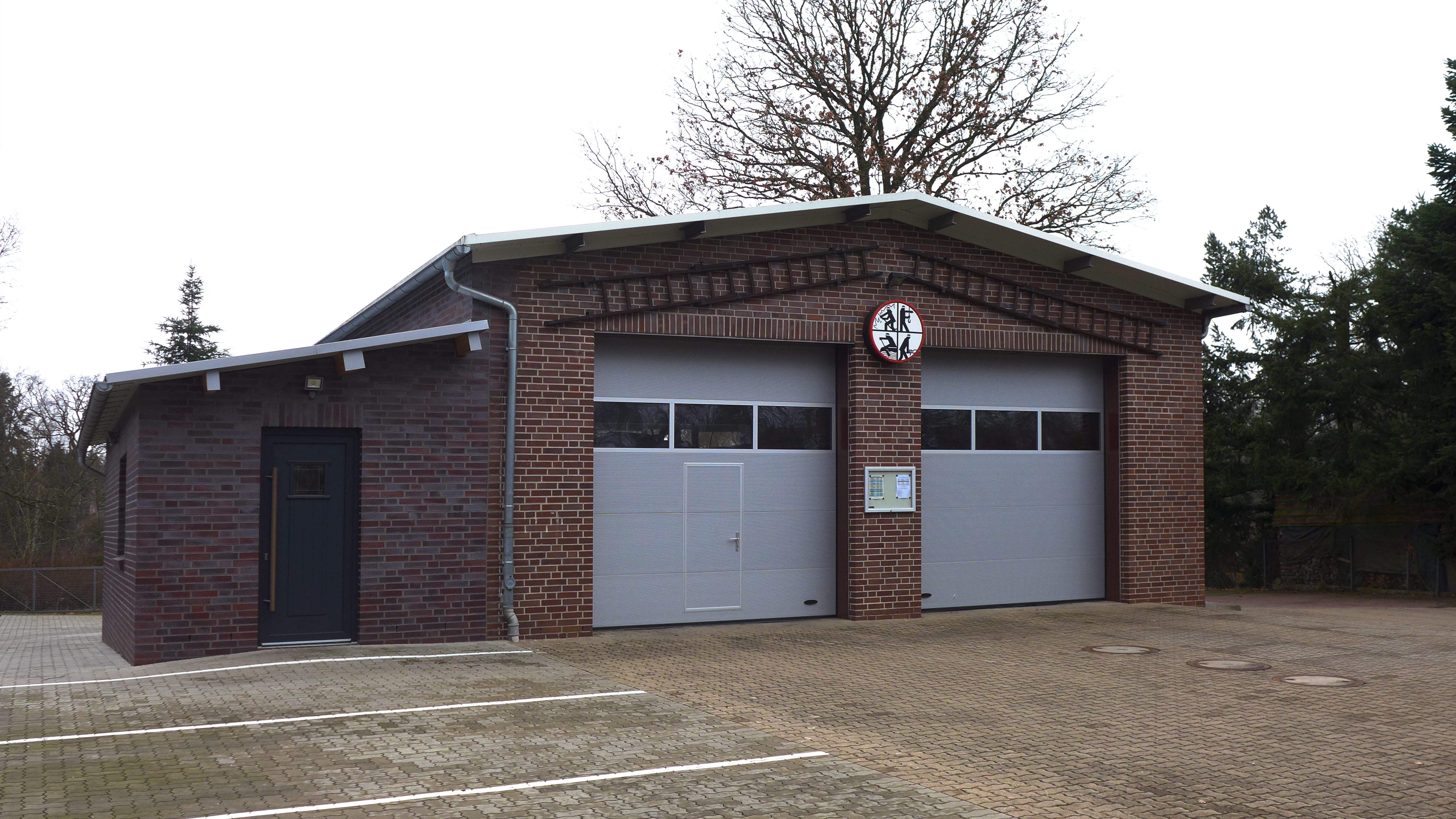 Gerätehaus der Freiwillige Feuerwehr Hützel (Bispingen), Aufnahmedatum 2017-02.